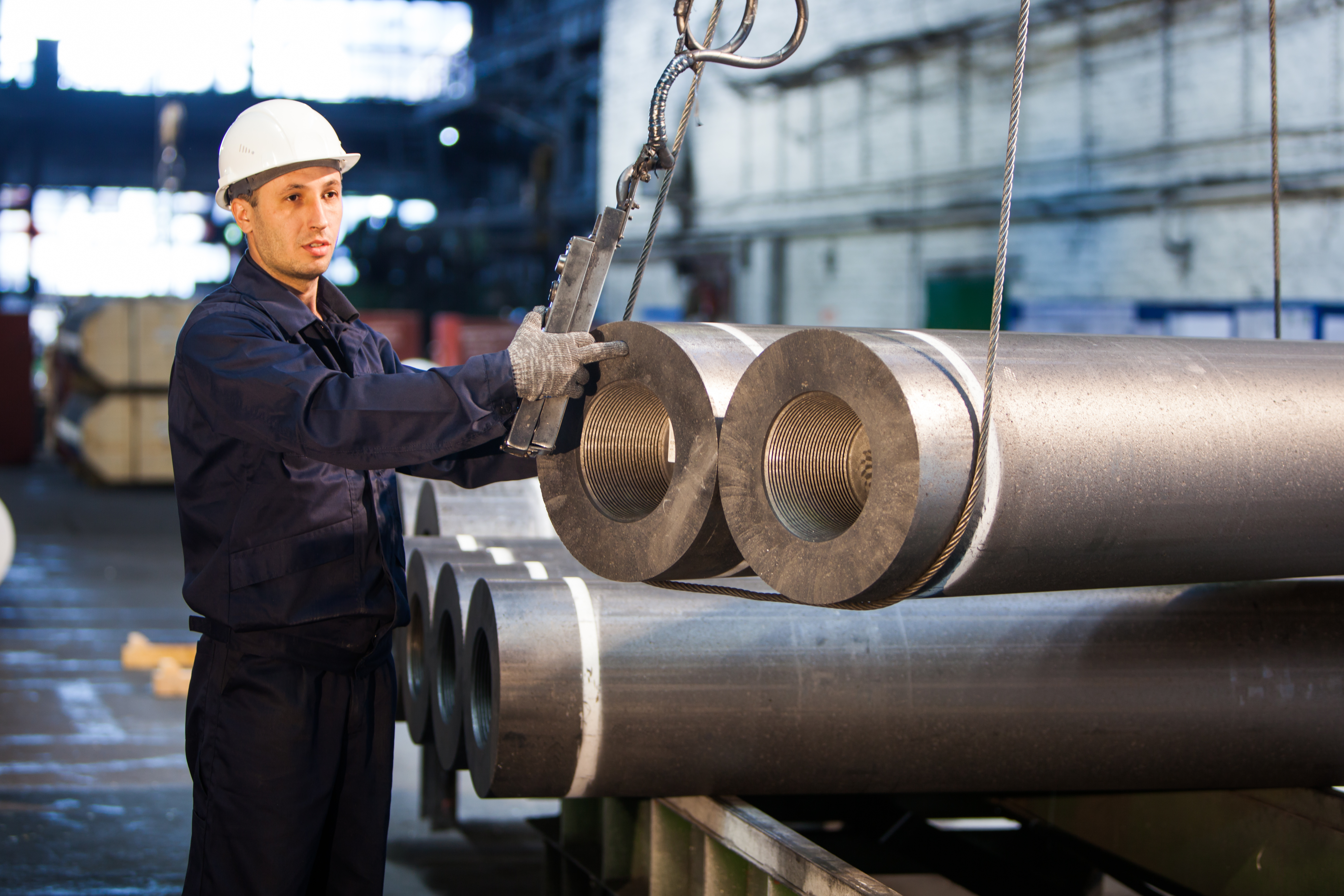 Графитированные электроды